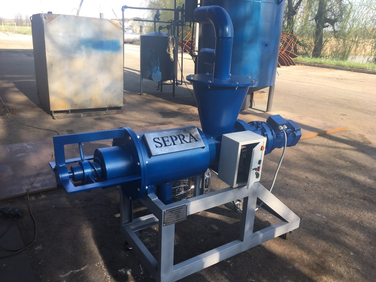 Шнековый сепаратор для отжима сырья